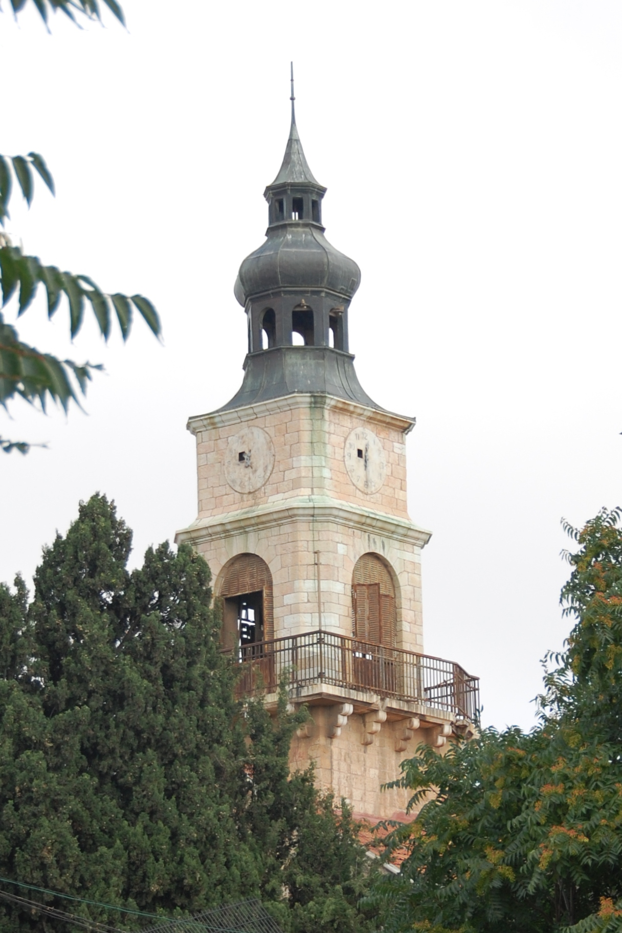 shneler in jerusalem